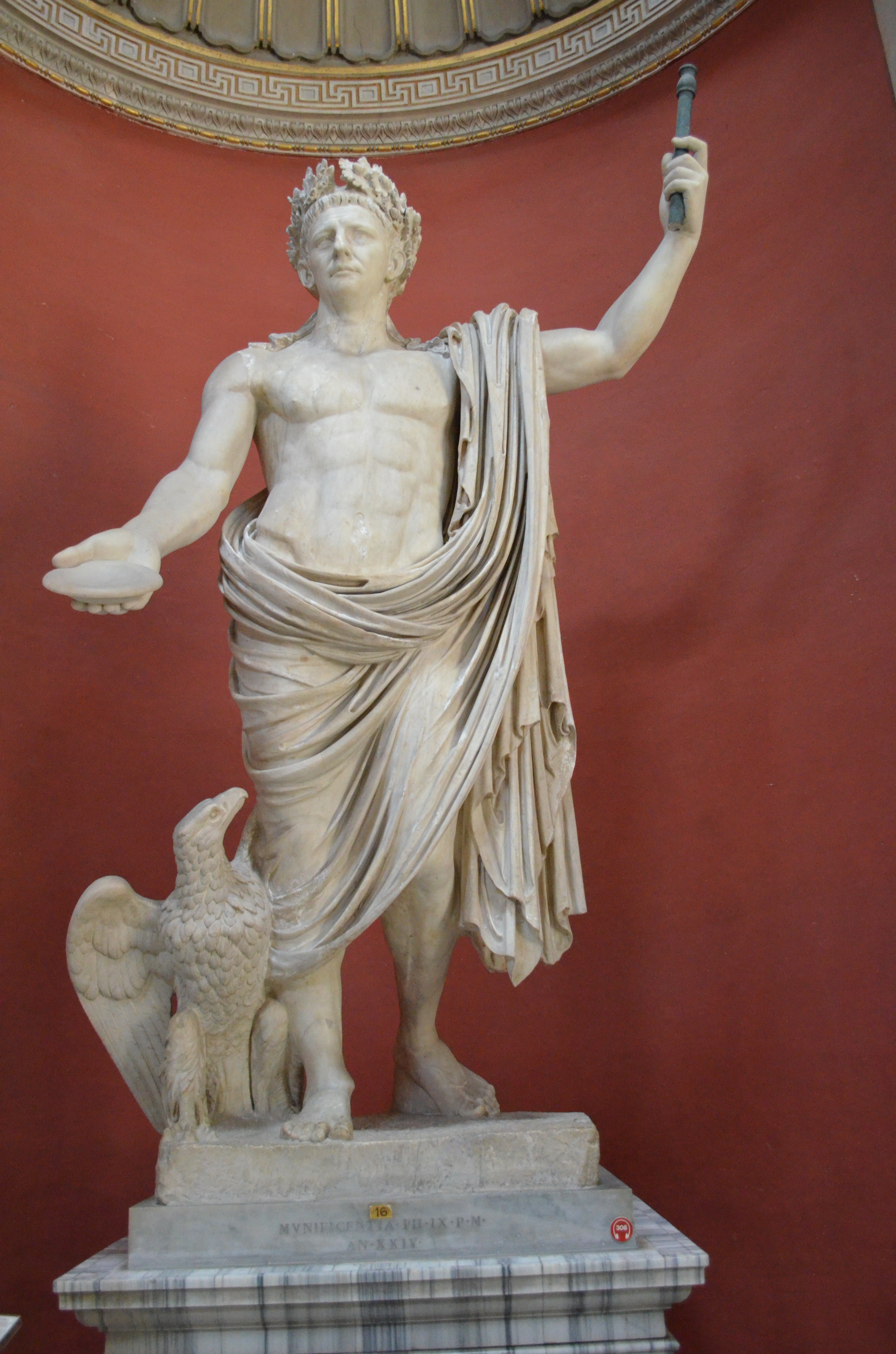 Vatican Museums